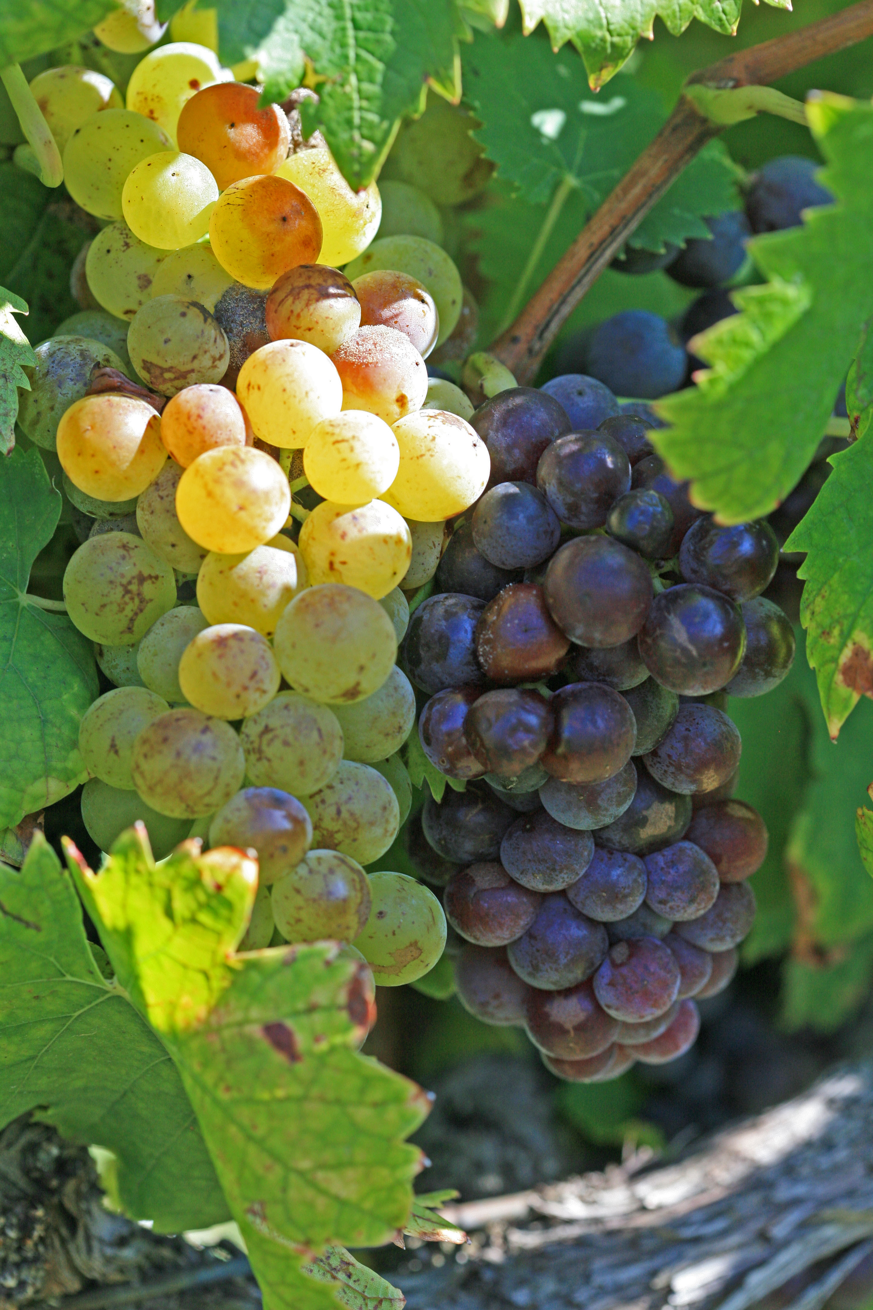 Muscat blanc et muscat noir - Beaumes-de-Venise, Vaucluse, France